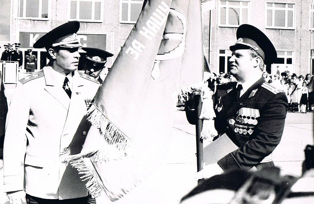 Главком ГСВГ генерал армии Зайцев М.М. вручает комбригу подполковнику Дорофееву А.А. Боевое Знамя 6-й гвардейской Берлинской ордена Богдана Хмельницкого отдельной мотострелковой бригады. Германия ГСВГ Берлин Карлхорст. Сентябрь 1982 год.